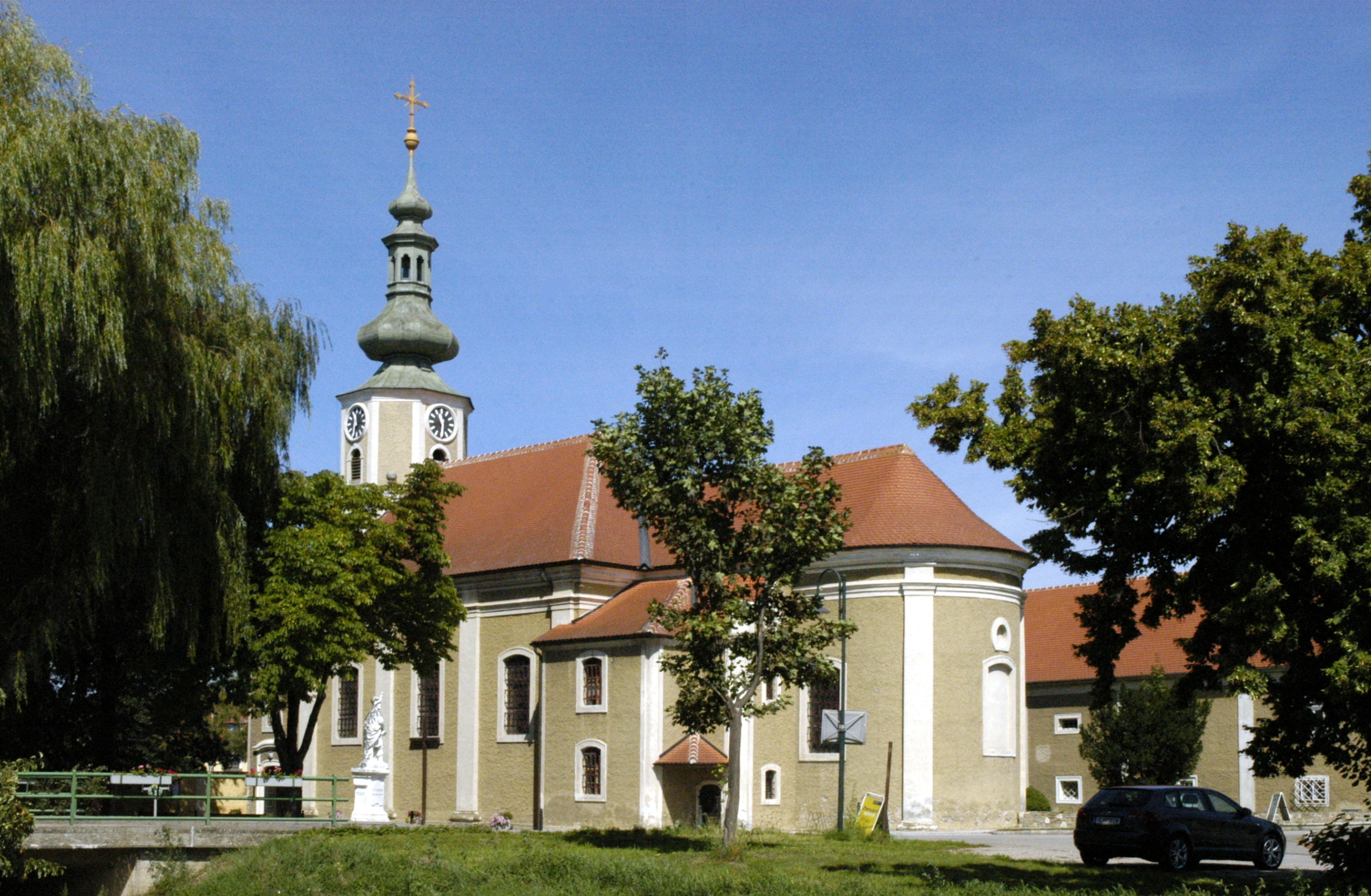 Kirche hl. Valentin in Gettsdorf, Gemeinde Ziersdorf